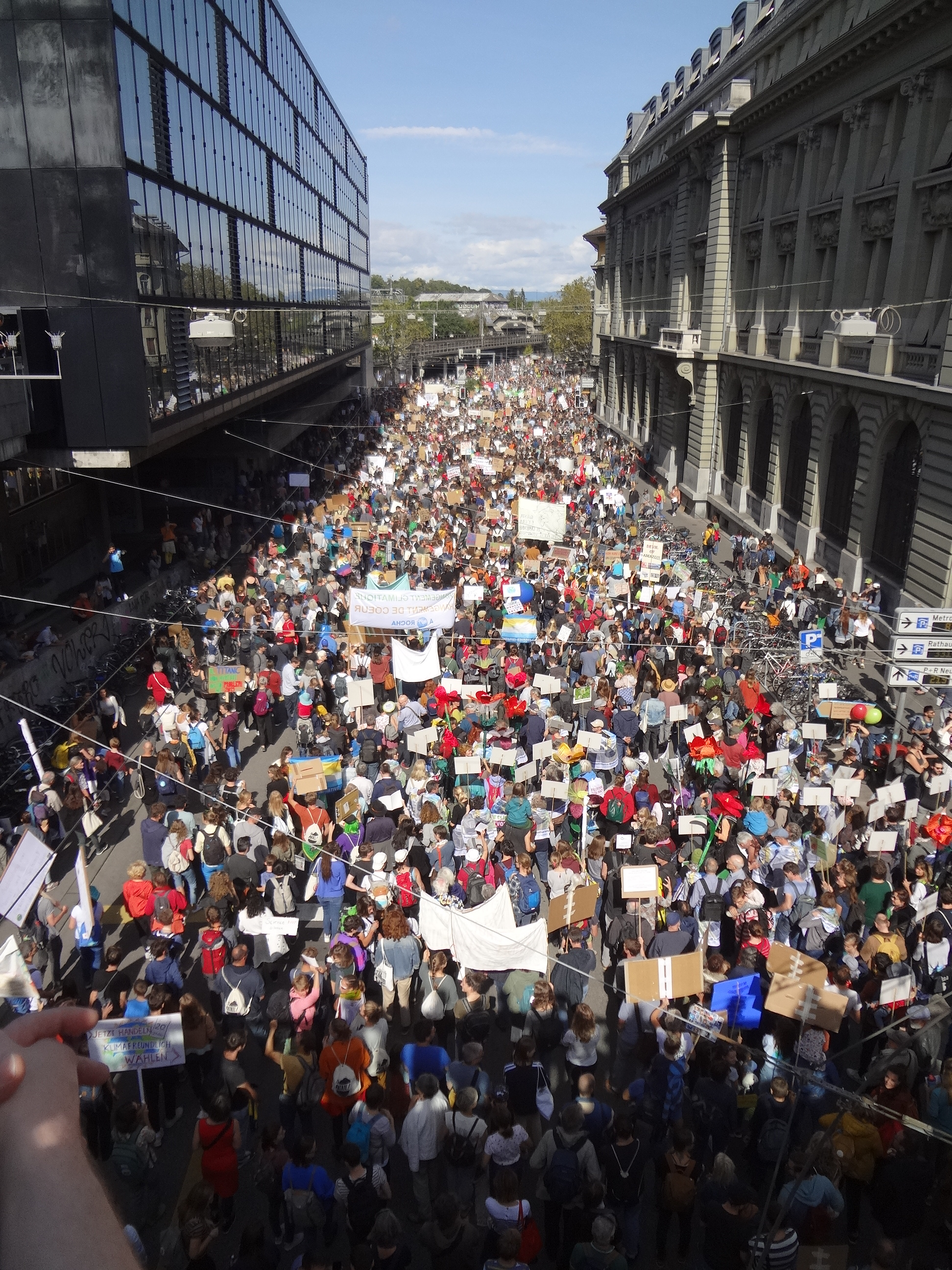 Manif climat à Berne 28 septembre 2019. Sur le Bollwerk, rue longeant la gare.